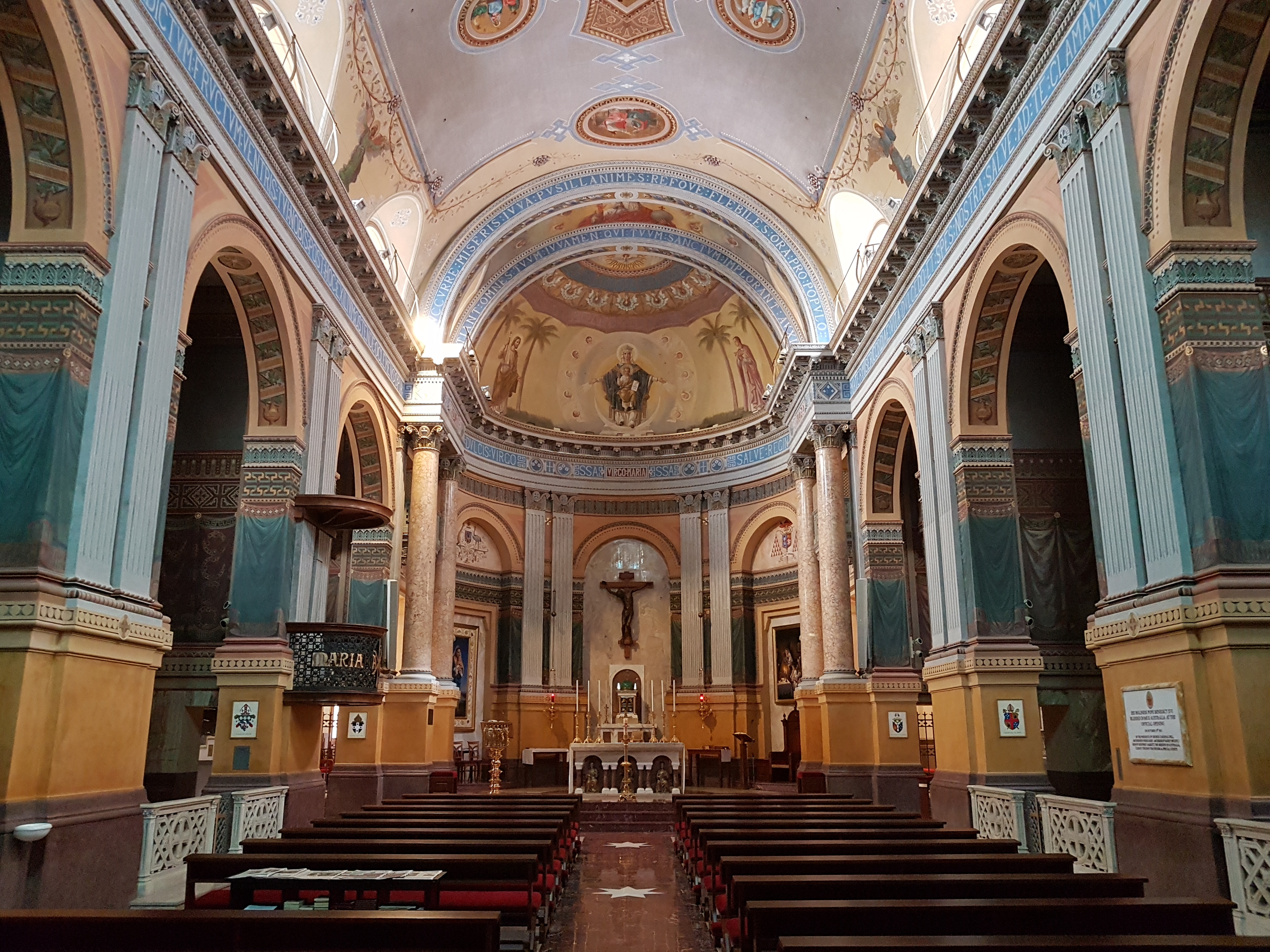 Santa Maria del Rosario di Pompei (Rome), Innenraum mit Blick zum Chor